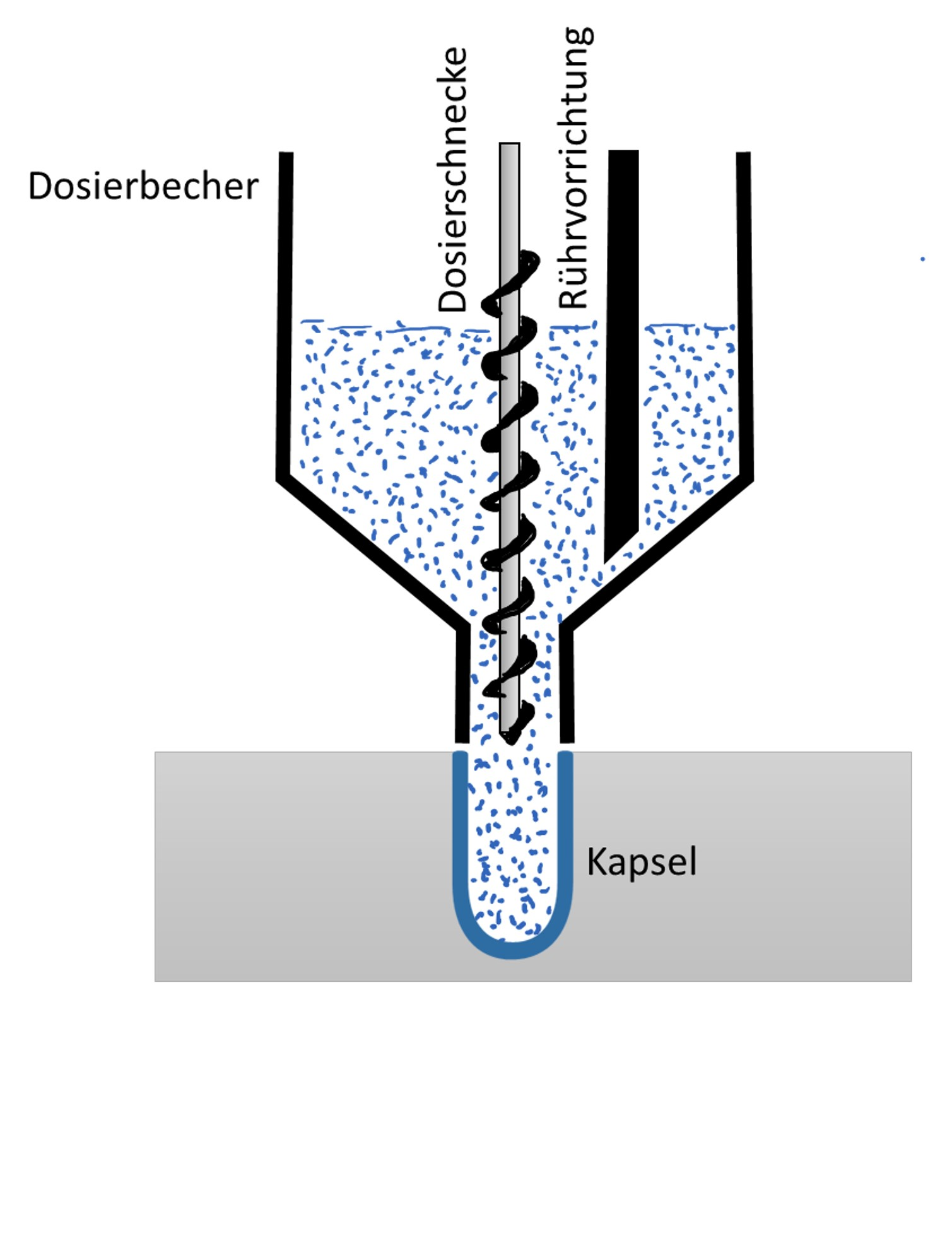 Der Schneckendosierer ist eine Methode um Kapseln in der pharmazeutischen Industrie zu befüllen und das Füllgut zu dosieren.